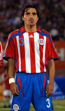 jjf